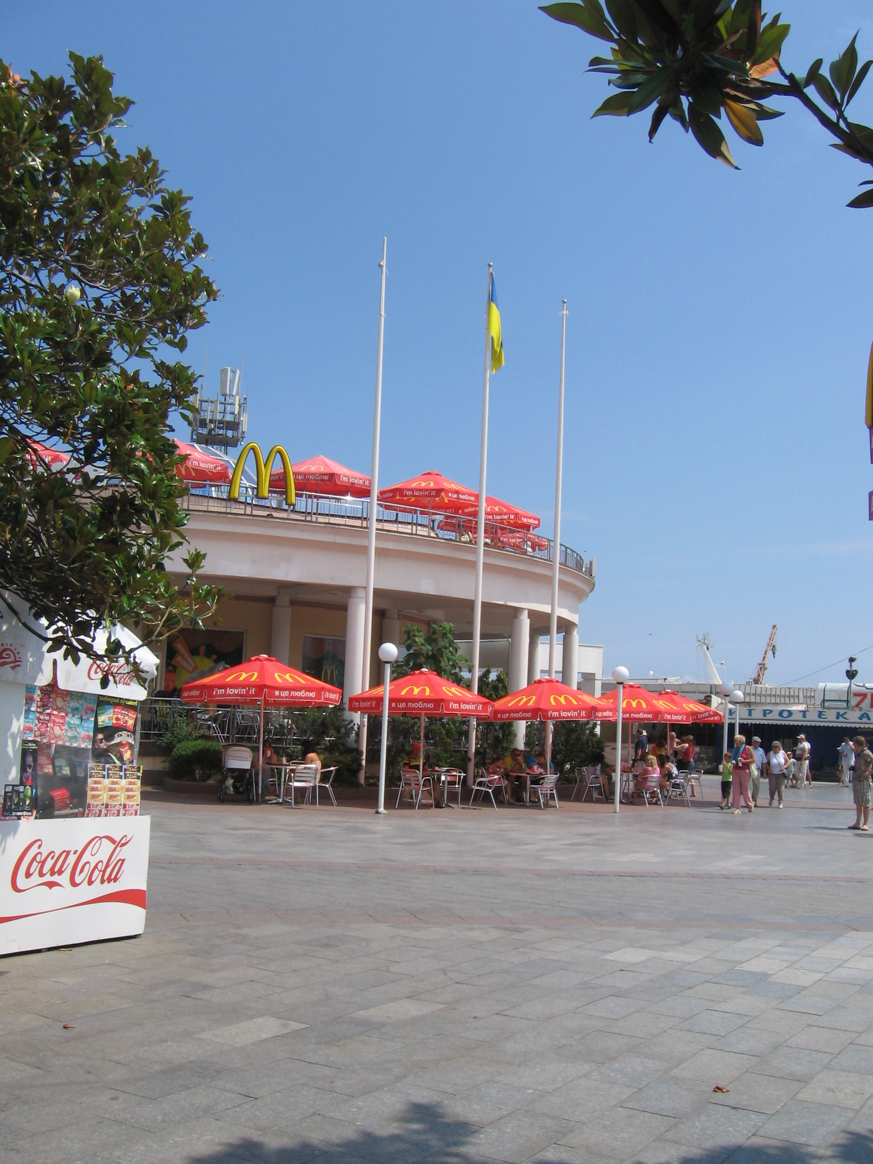 Фото